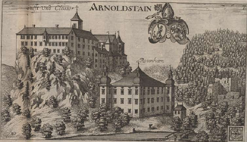 Digitalisierung: Seiten 13&14: Ansicht Arnoldsteins